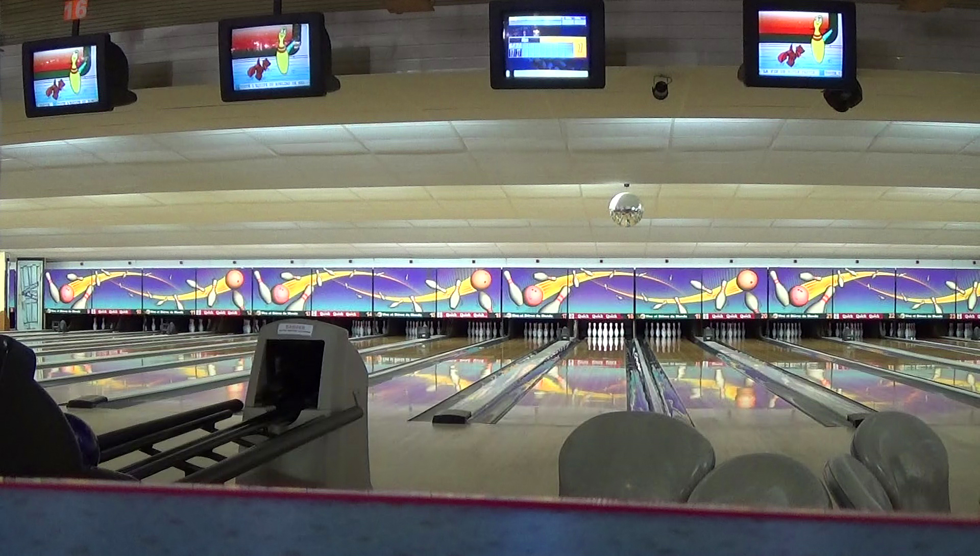 Bowling international de l'avenue de la Marne